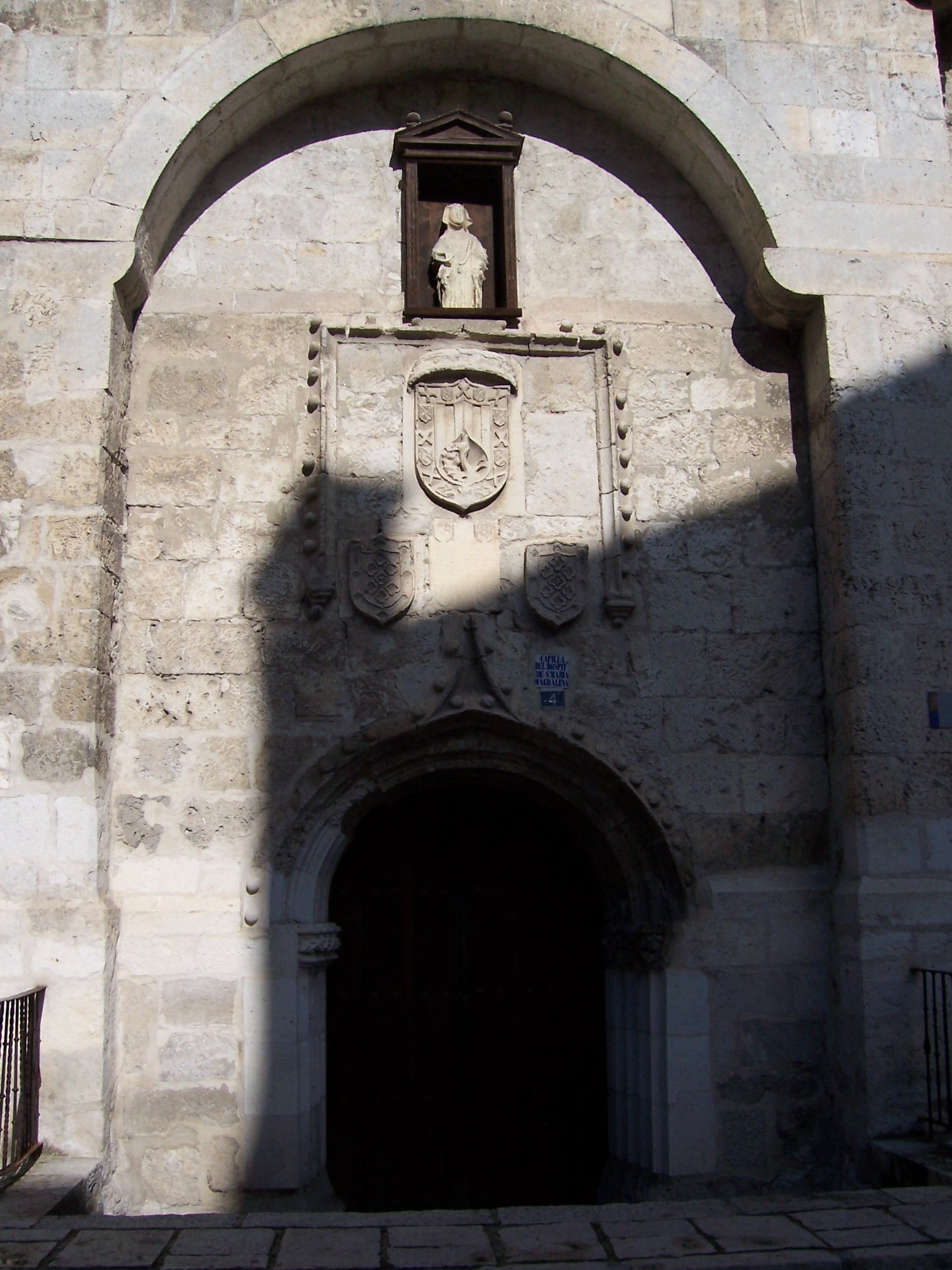 Hospital de la Magdalena, edificado en 1429. Cuéllar (Segovia, España). Autor de la imagen: Lourdes Cardenal, noviembre de 2005.